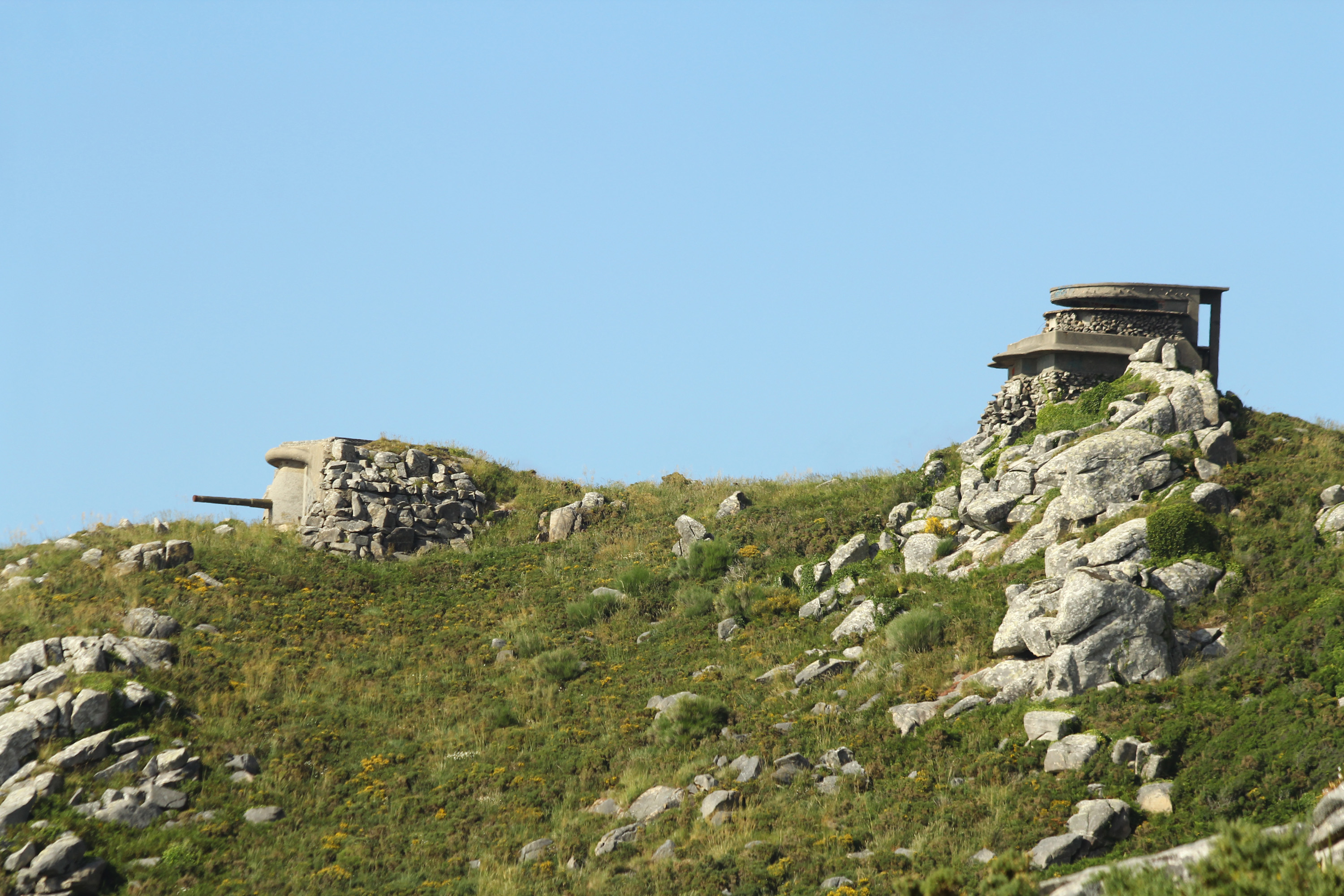 Cañón Vickers 152,4/50mm y búnker de telemetría de la antigua batería de artillería de costa J4 de Cabo Silleiro, en Bayona, construida durante la Guerra Civil Española y hoy abandonada. Vickers canyon and telemetry bunker Vickers 152.4/50mm canyon and telemetry bunker of the former coast artillery battery J4 of Cape Silleiro, in Bayona, built during the Spanish Civil War and now abandoned.